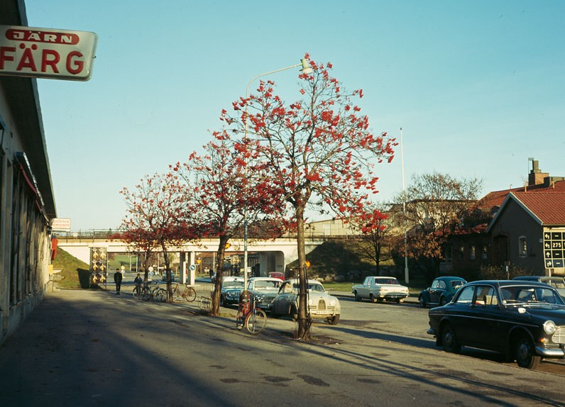 Rönnar med bär på Färjestadsvägen vid kv. Applåden. Vy åt nordost mot tunnelbanestationen Ängbyplan